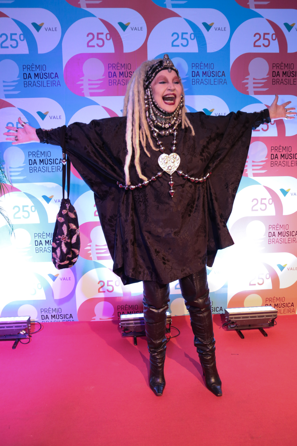 Elke Maravilha durante o 25º Prêmio da Música Brasileira no Theatro Municipal. Foto: Reginaldo Teixeira (14/05/14)